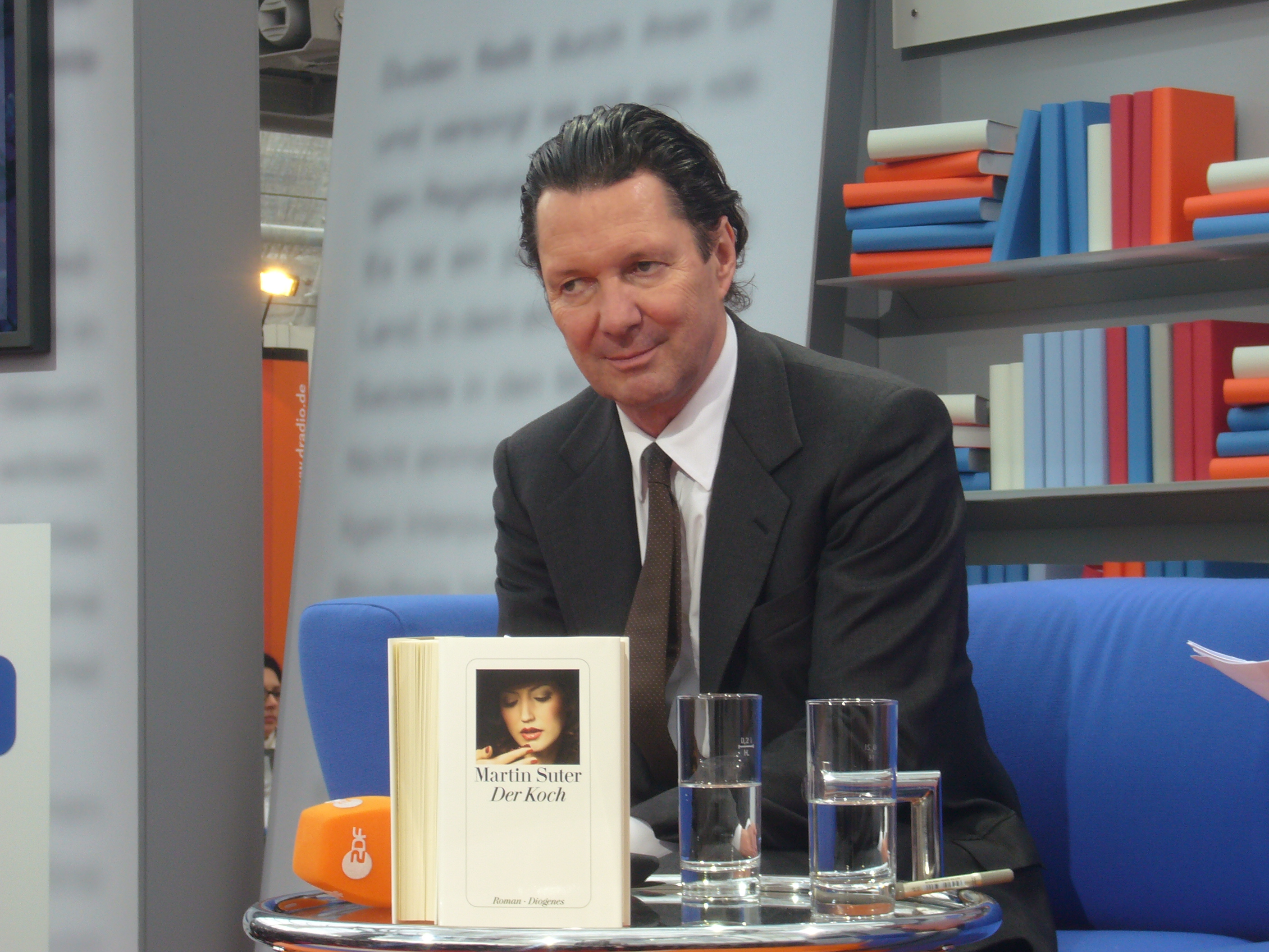 Martin Suter auf dem Blauen Sofa